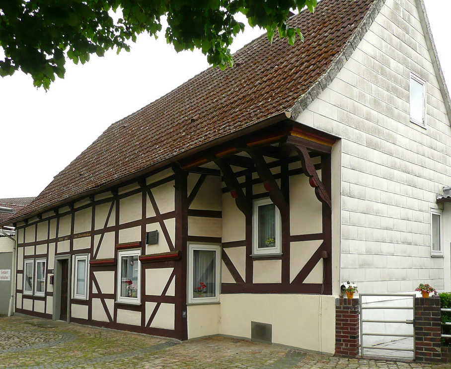 Vorsfelde, Meinstrasse 14